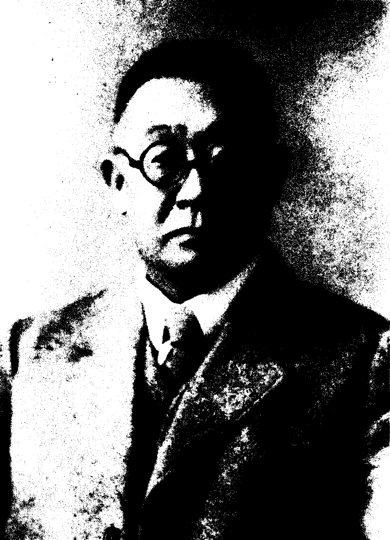 晩年の土屋元作